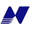 Company logo of Nagaragawa Railway